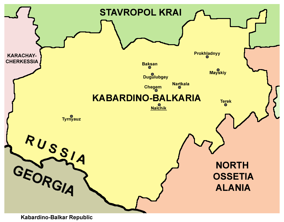 Map of Kabardino-Balkaria Republic, Russia.